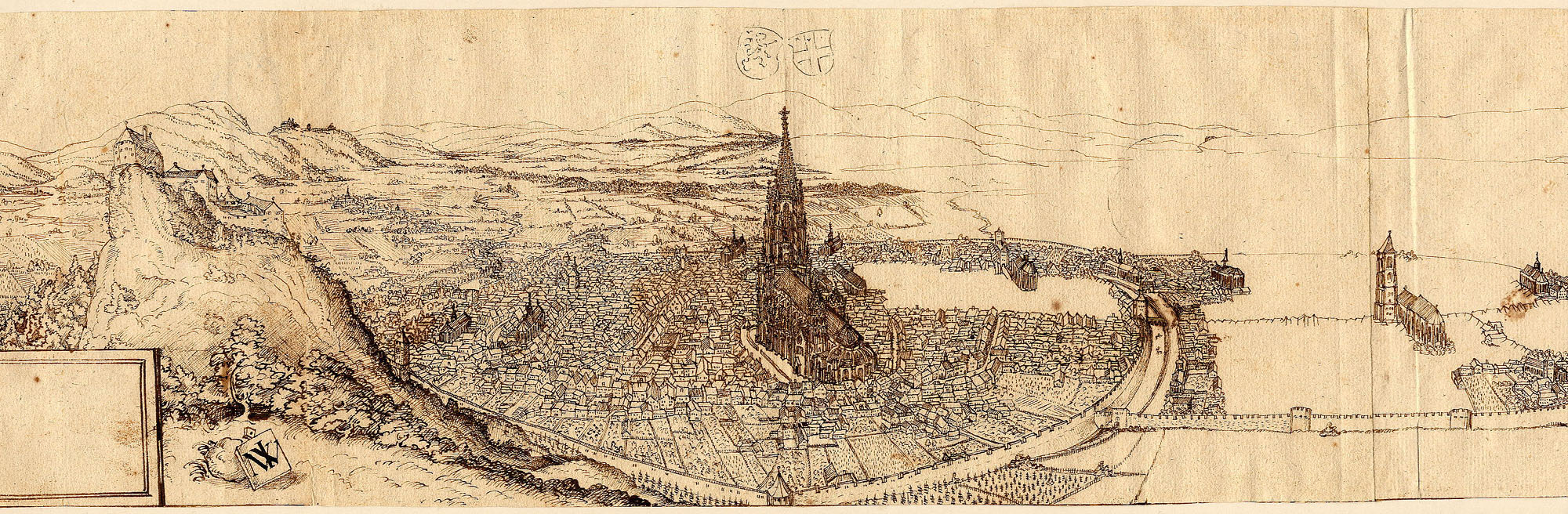 Meister N.J.W.: Freiburg im Breisgau, kolorierte Federzeichnung